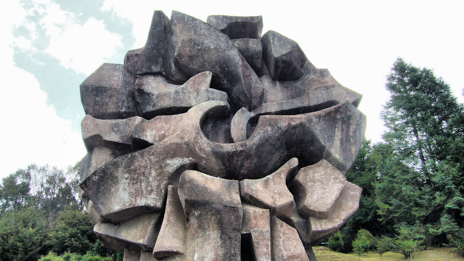 Escultura Central "Piedra del Sol" de Pedro Cervantes en el Centro Ceremonial Otomi